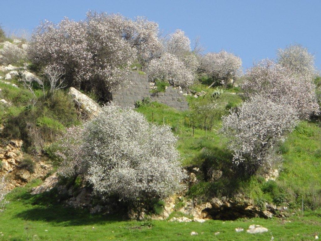 בוסתני עצי פרי ופריחת עצי השקד במורדות הצפוניים של נחל ראש פינה.